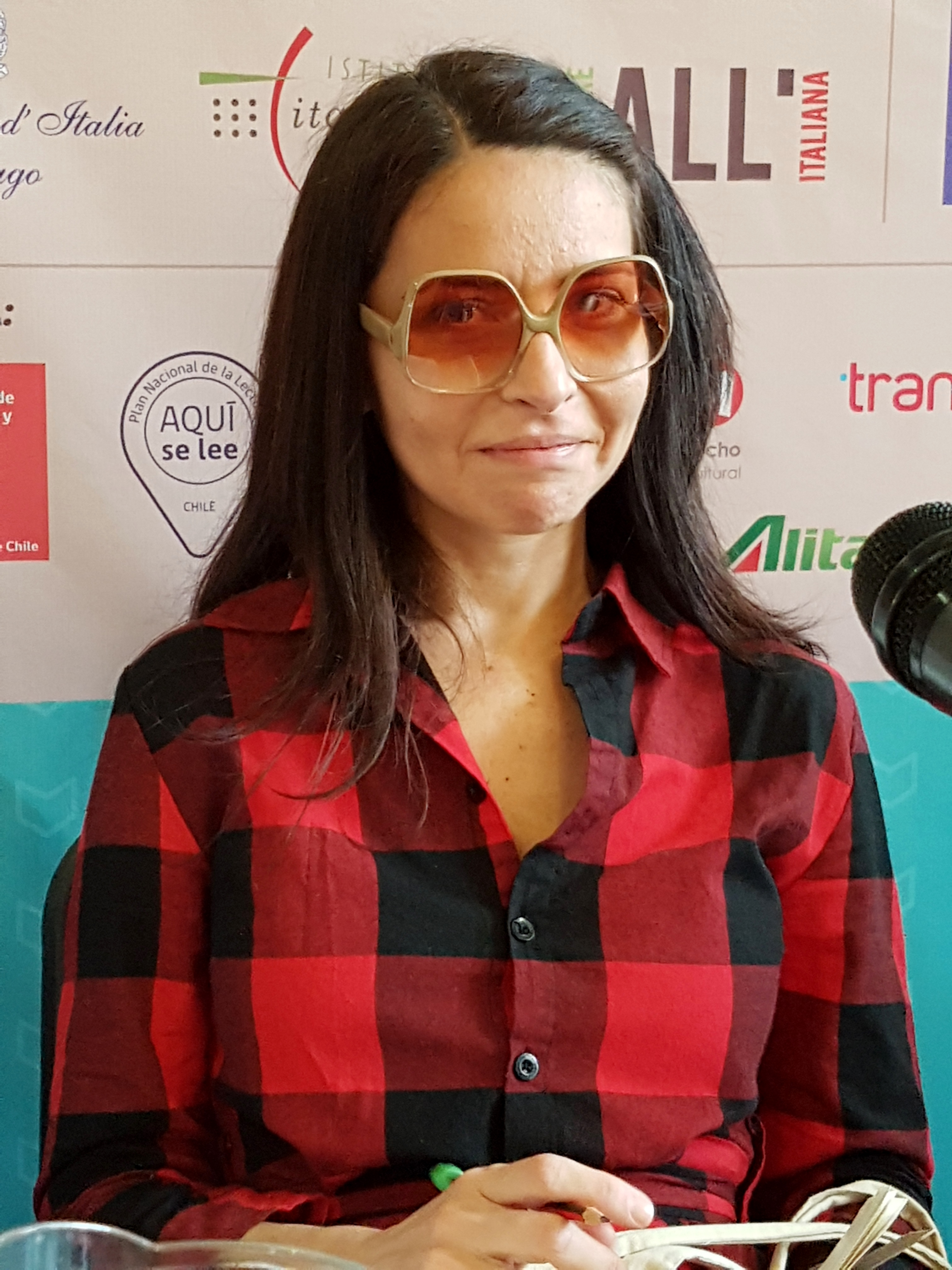 La escritora argentina Lola Copacabana en la Feria Internacional del Libro de Santiago 2017.